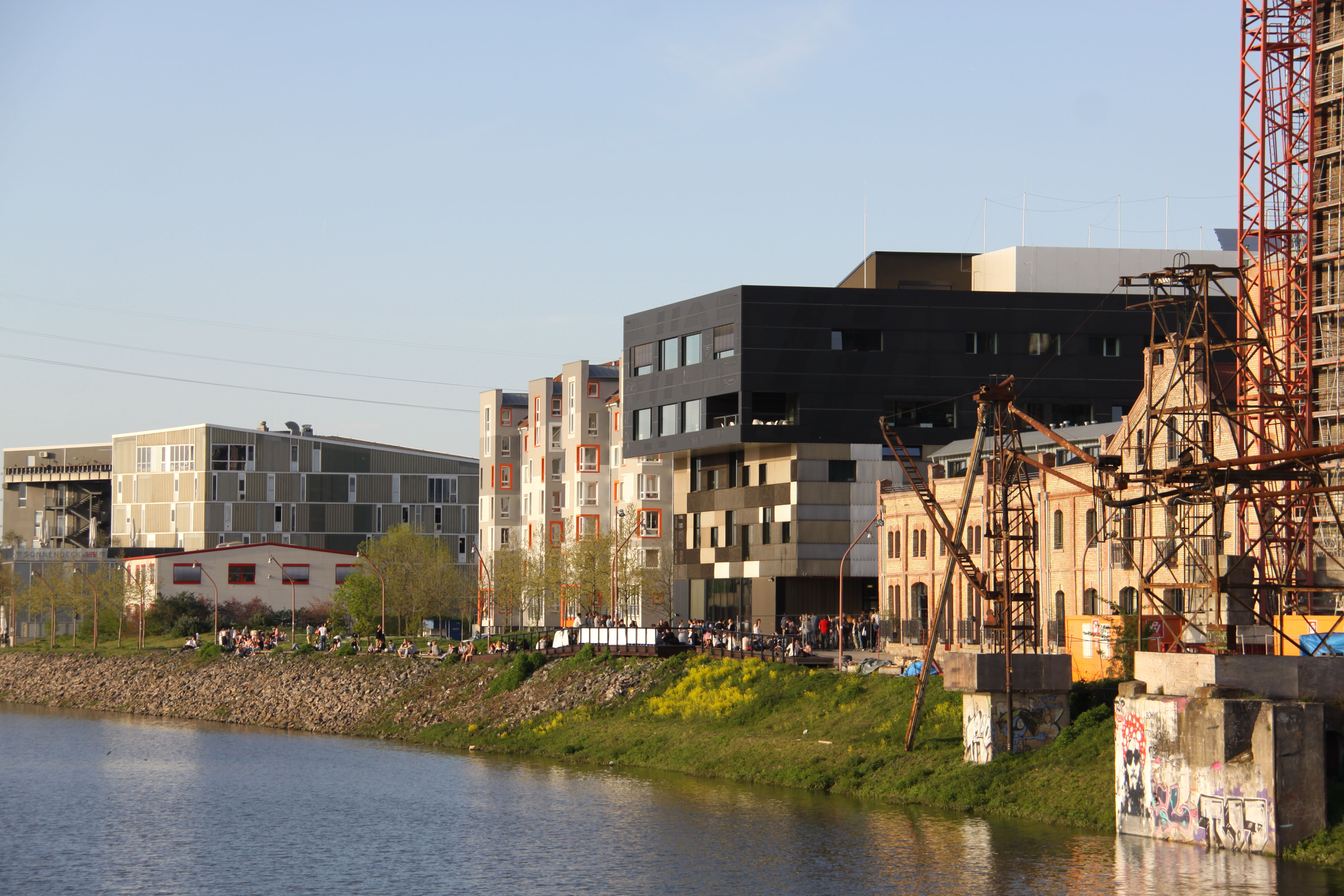 Popakademie, Ansicht vom Kanal aus